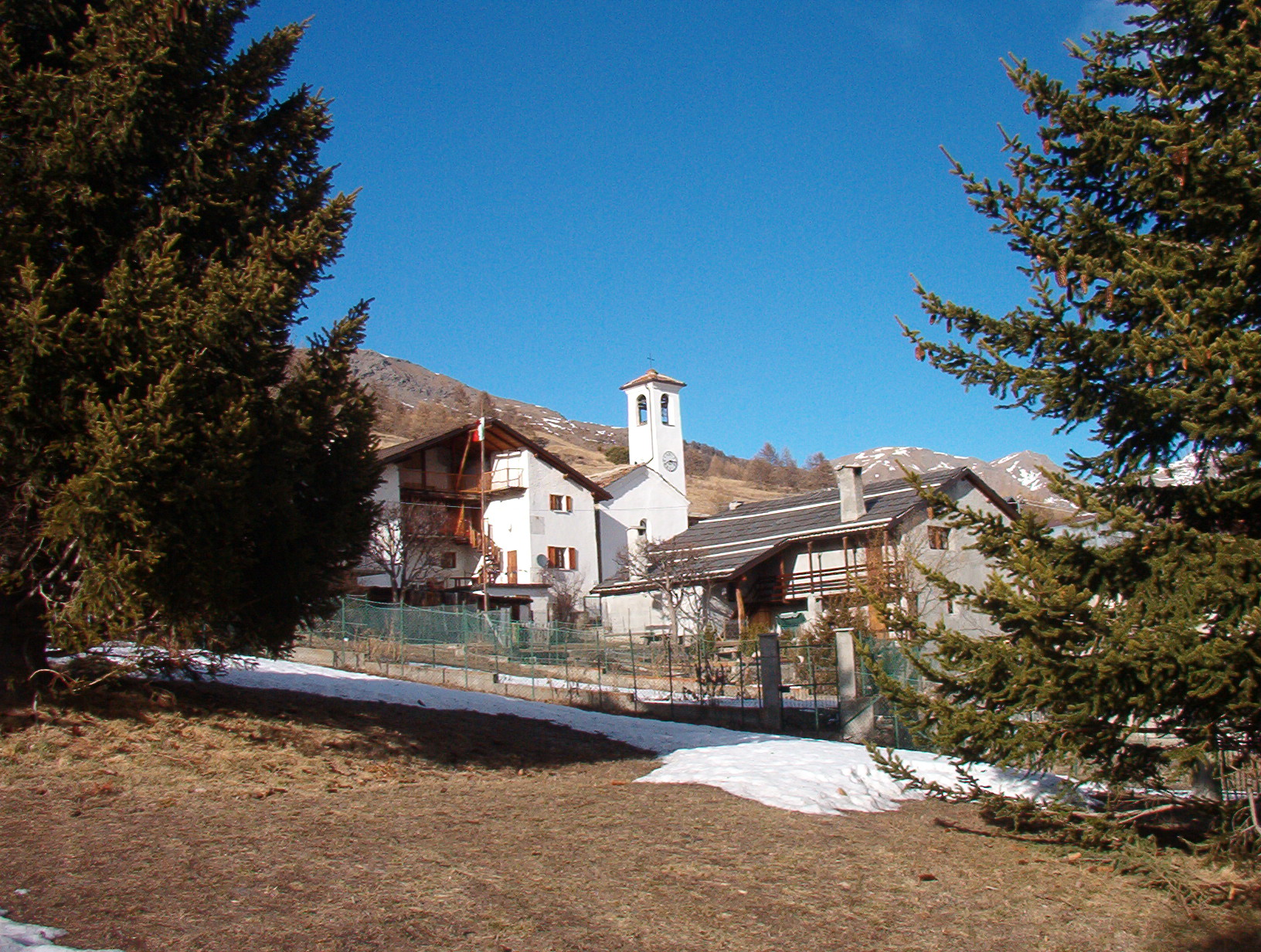 Gran Puy - frazione di Pragelato - Val Chisone - Provincia di Torino - Italy